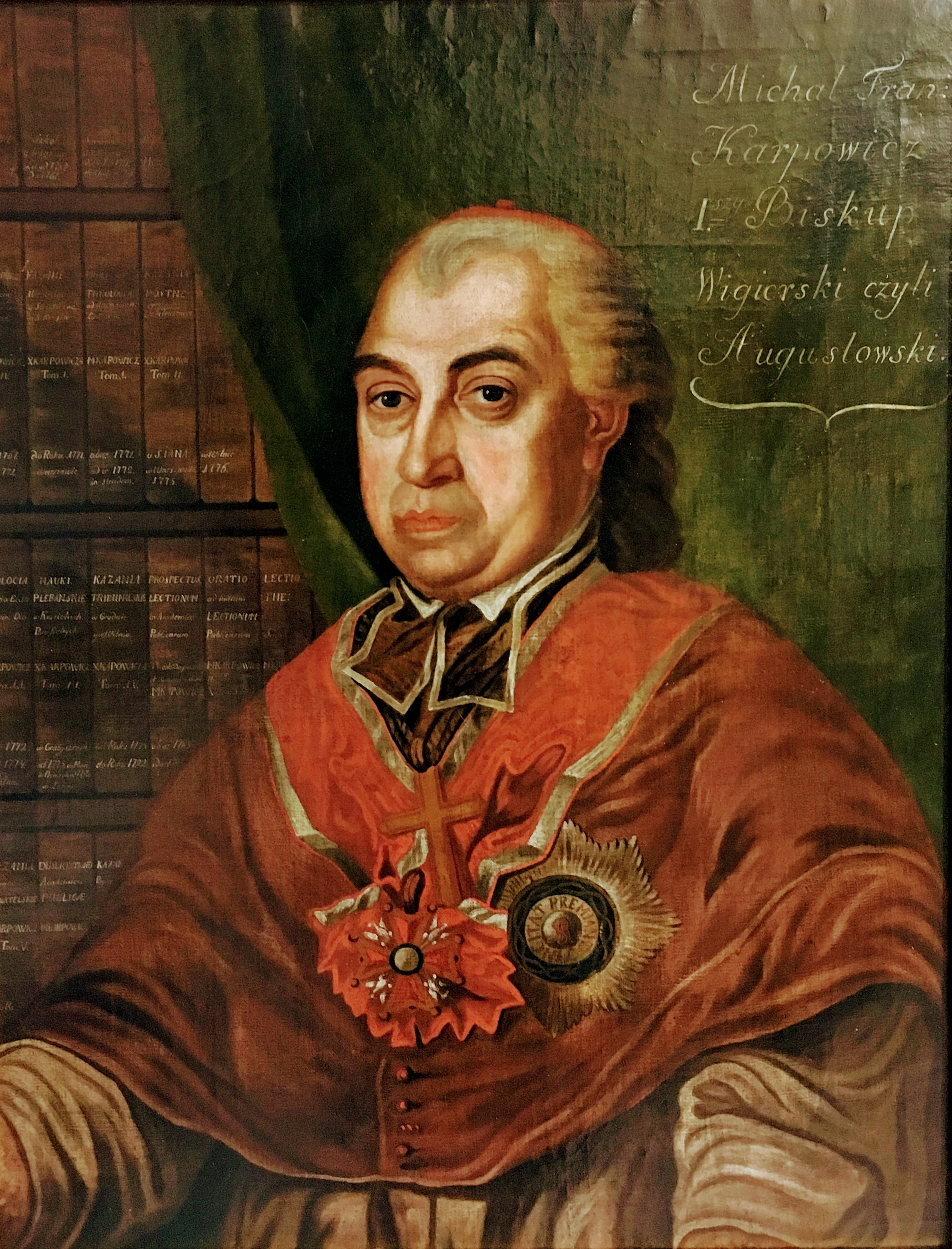 Portret bp. Michała Franciszka Karpowicza, koniec XVIII w., Muzeum Diecezji Łomżyńskiej